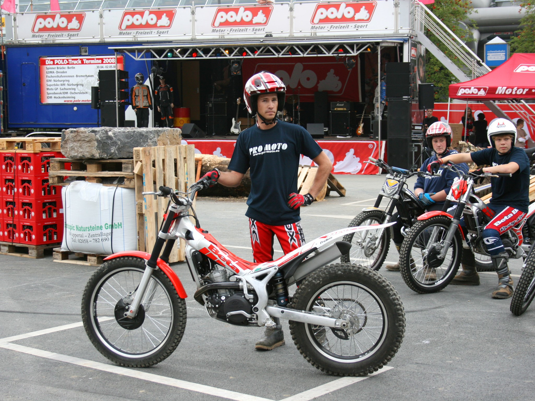 NRW-Tag an der Ohligsmühle in Wuppertal